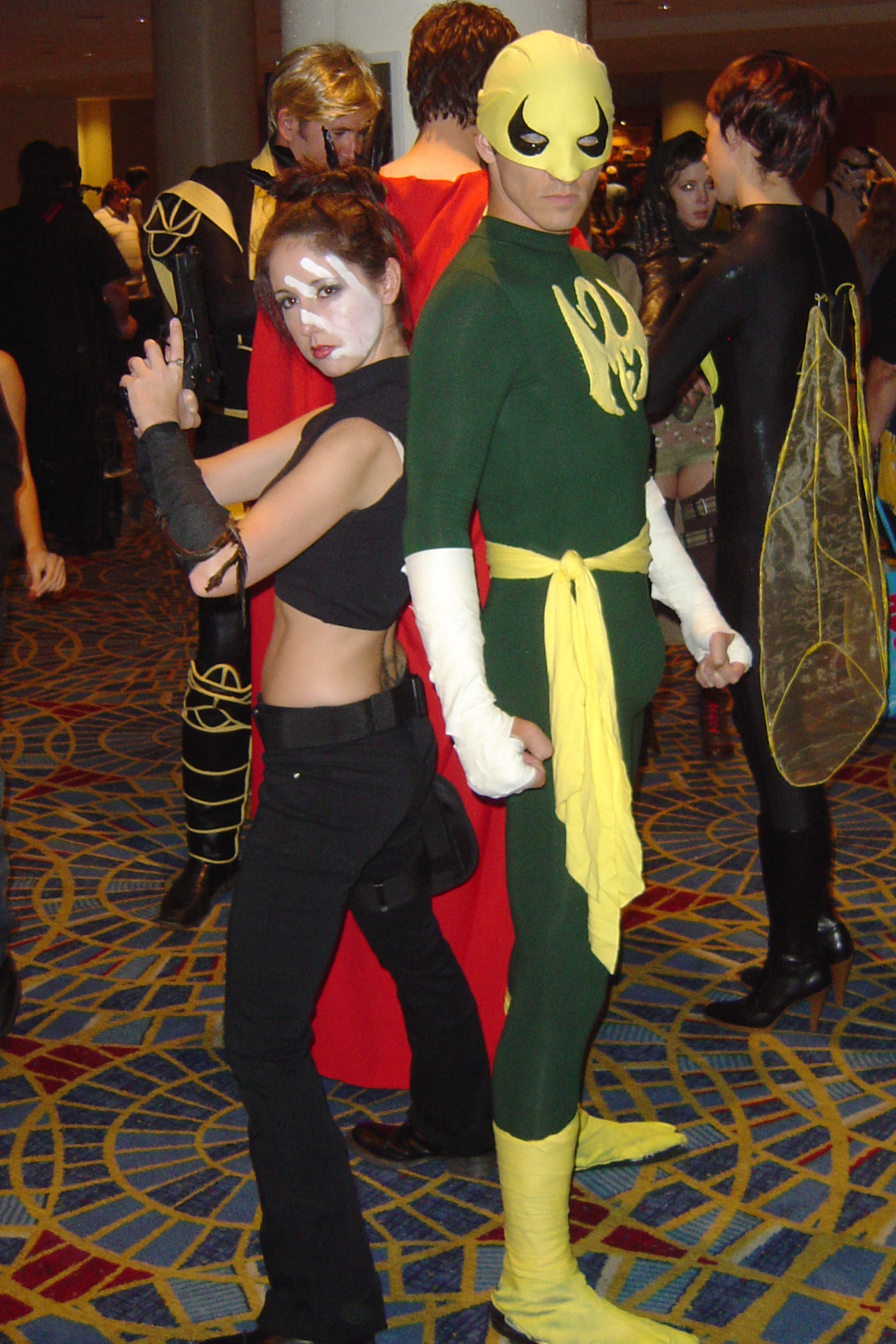 Cosplay at Dragon*Con 2009.